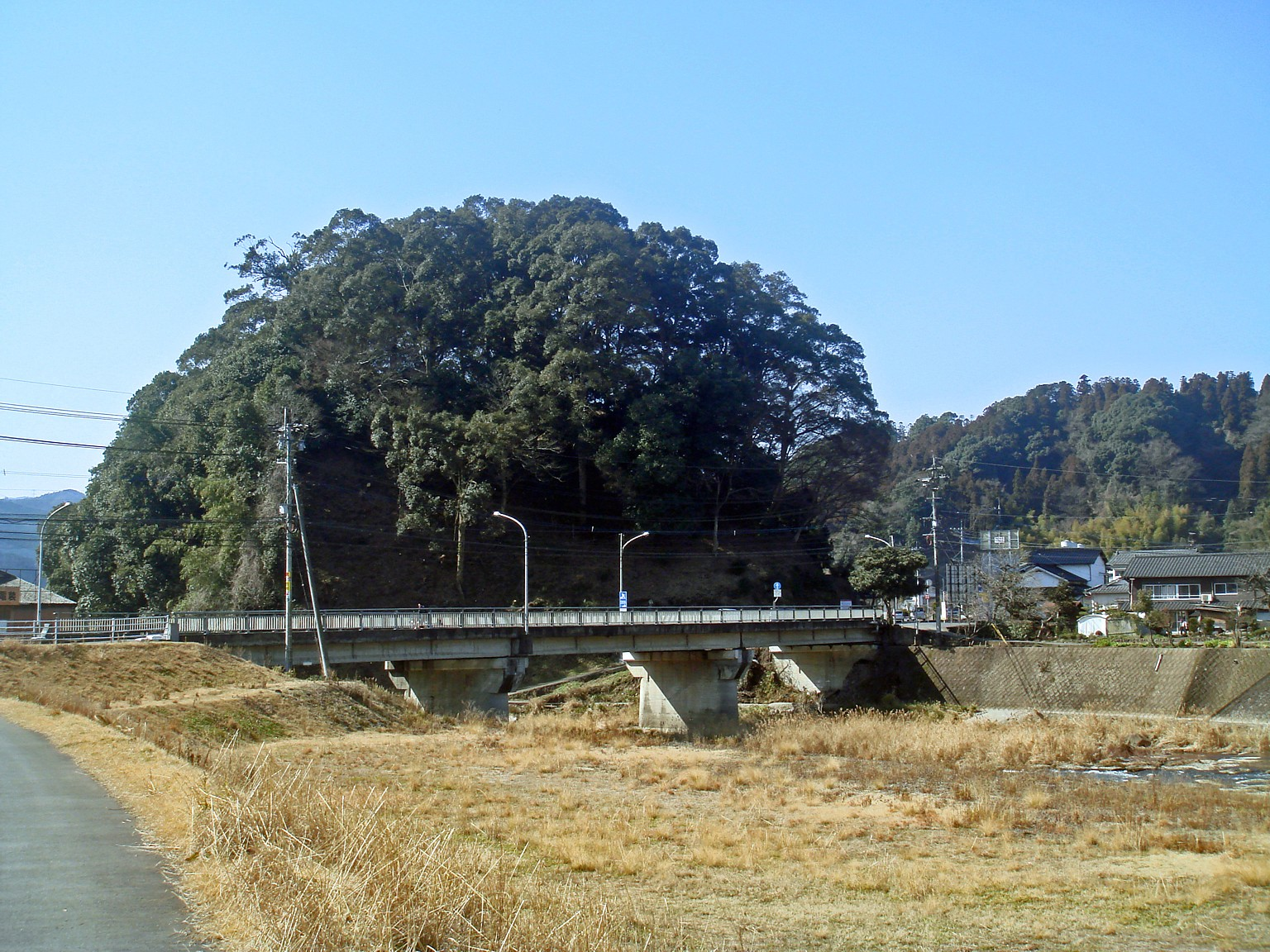 日本国大分県日田市の星隈公園を、三郎丸橋北の花月川土手（ニッポー物流サービス付近）より撮影。星隈公園は、水蝕残丘であり、月隈山・日隈山に並ぶ三隈三山の一つである。安土桃山時代末から江戸時代初めには、日田郡に入封した小川壱岐守光氏の仮城として利用された。城名は不明だが、三郎丸砦や星隈城とも呼ばれる。